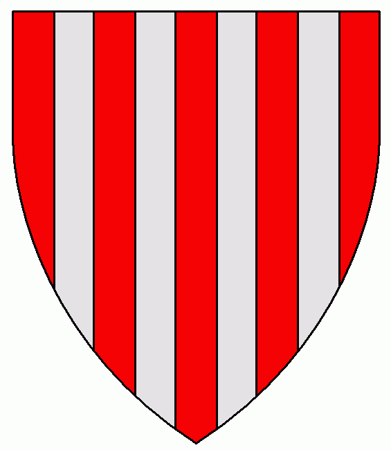 Escut d'armes de la família Vilamarí (ss. XI-XVI) / Coat of arms of Vilamarí family (11th-16th c.)